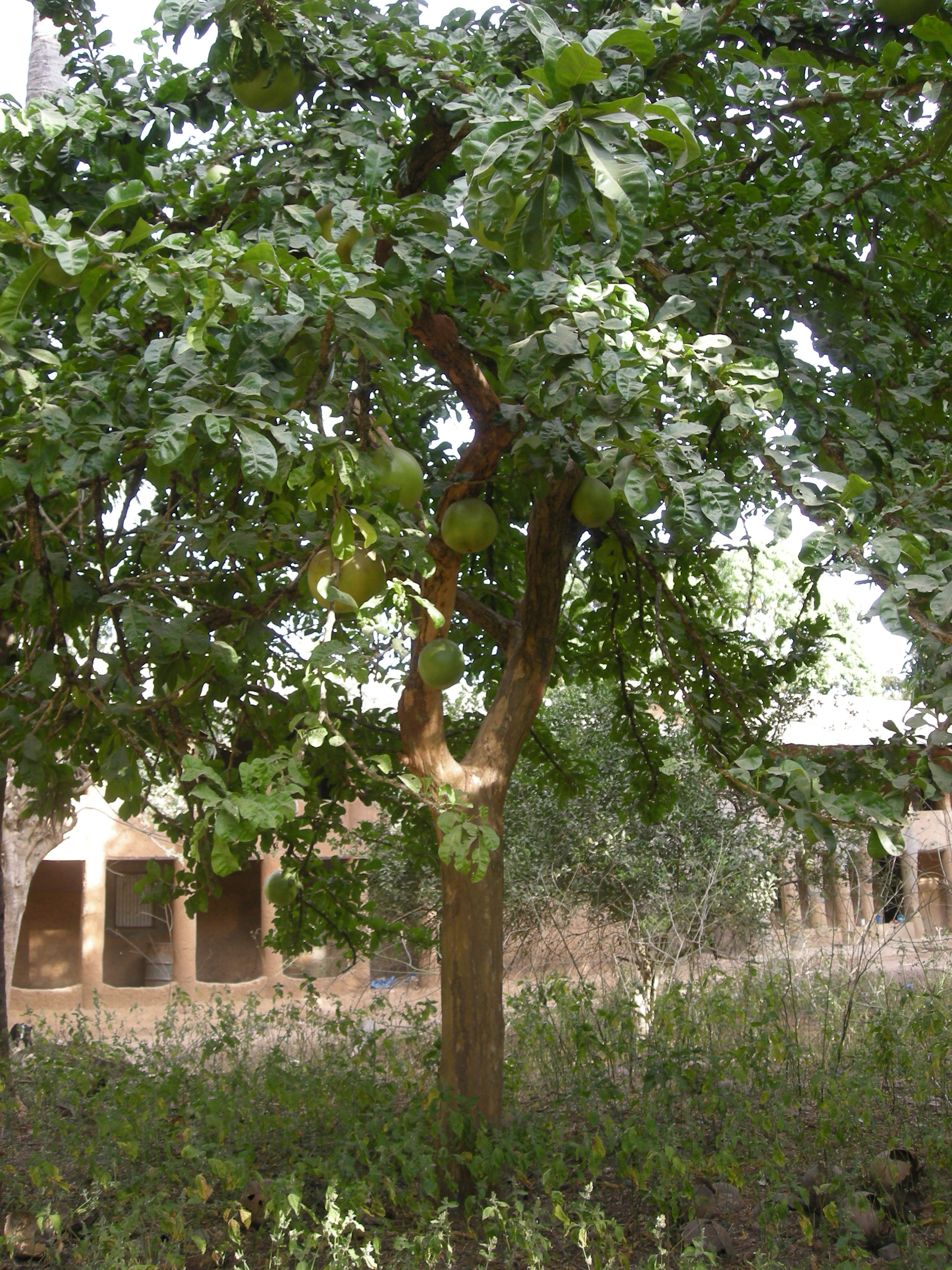 Calebassier à Mlomp (Casamance, Sénégal), à l'arrière d'une case à étages